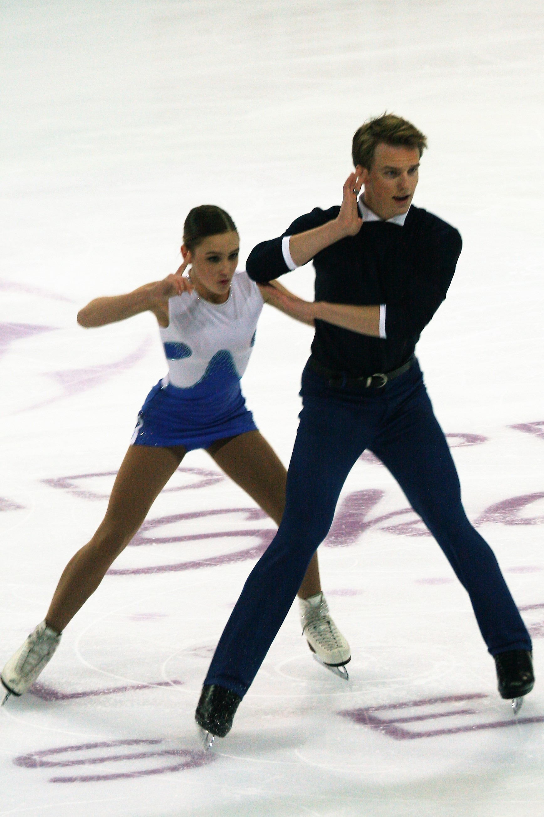 Амина Атаханова / Илья Спиридонов (Россия) на финале Гран-при по фигурному катанию среди юниоров 2016-2017